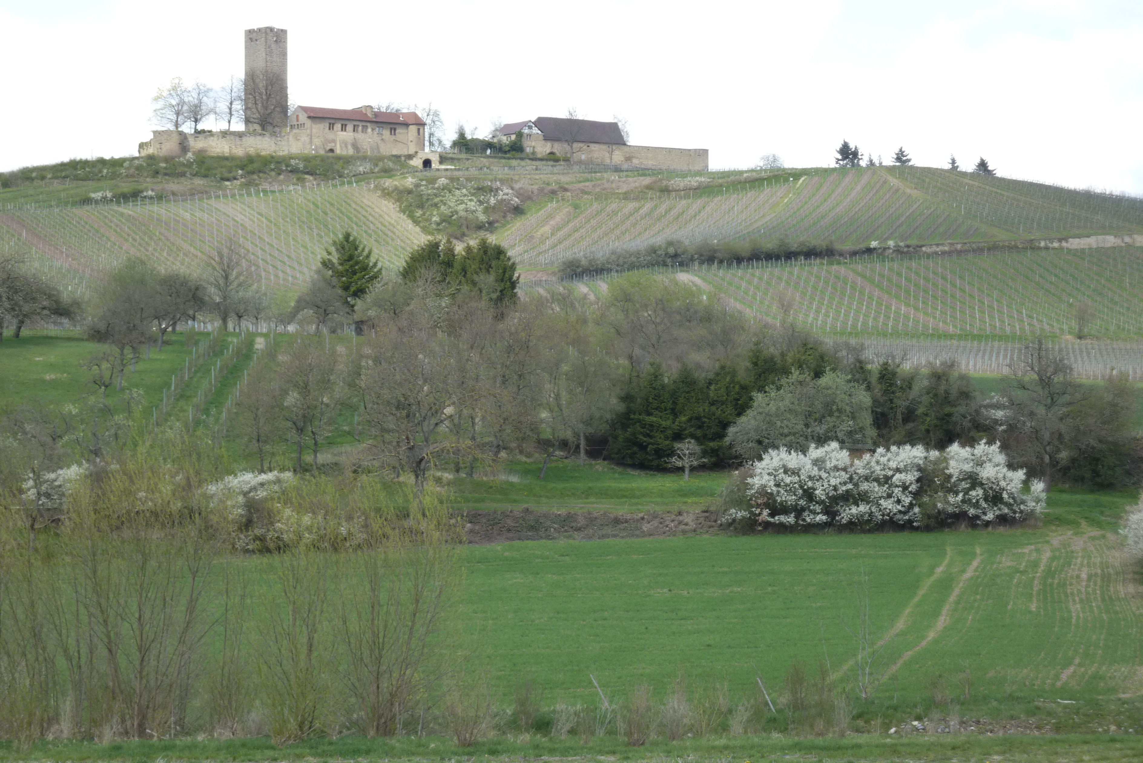 Ravensburg (Sulzfeld) mit Weinbergen